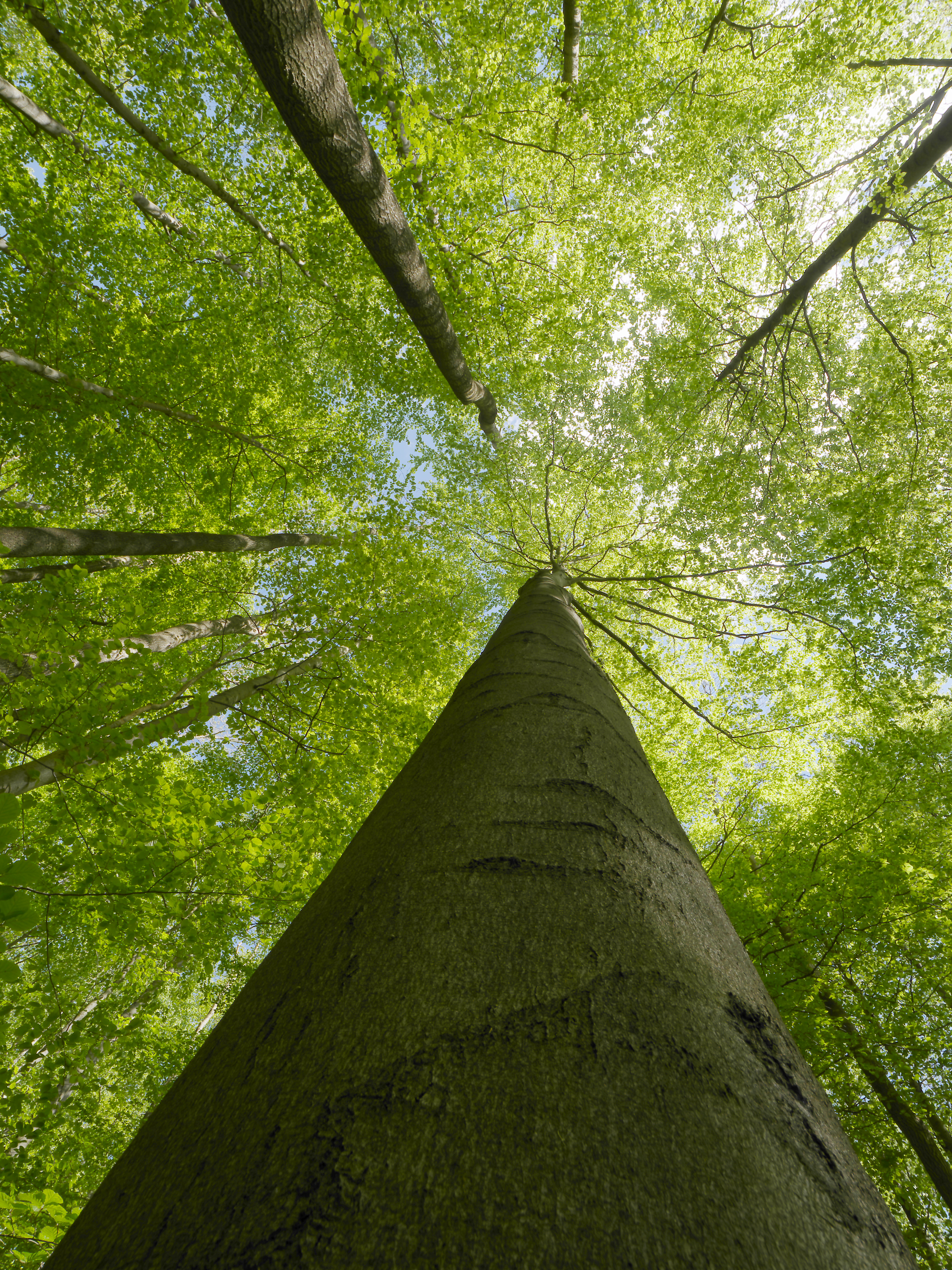 Nationalpark Hainich, Thüringen, Deutschland, Buche im Kerngebiet des UNESCO Weltnaturerbes der alten europäischen Buchenwälder